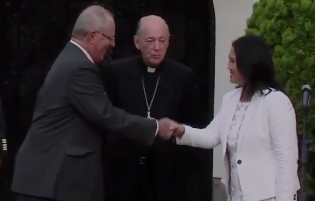 Keiko Fujimori e Pedro Pablo Kuczynski em dezembro de 2016